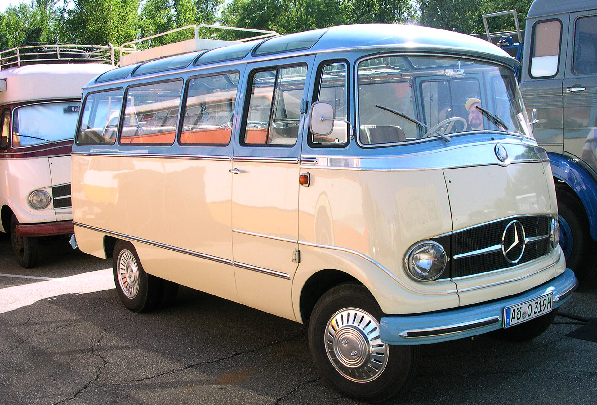 Wörth am Rhein beim Oldtimer-Treffen bei Daimler-Chrysler Mercedes-Benz L319 Bus mit Panoramaverglasung